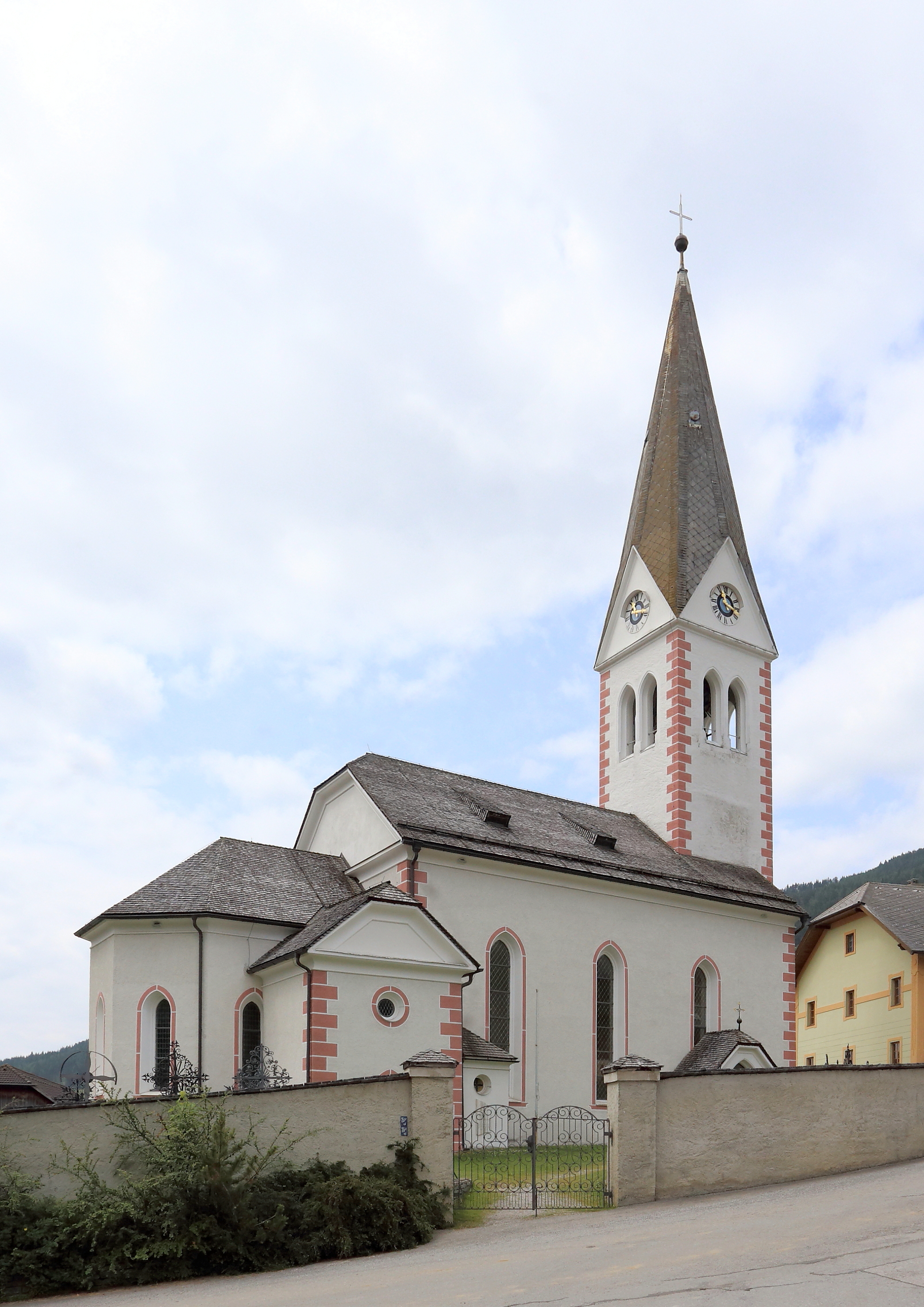 Katholische Pfarrkirche hl. Paulus in der Salzburger Gemeinde Lessach. Der Altarraum ist gotisch und stammt um 1500. Das Langhaus zwischen Turm und Chor (Altarraum) wurde in der Mitte des 18. Jahrhunderts neu errichte. Die jetzige Form der Kirche hat sie nach einem Großbrand im Jahr 1908 erhalten.